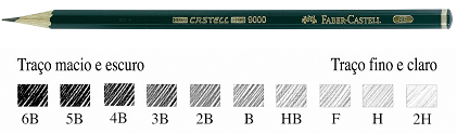 Lápis mais tradicional no mercado